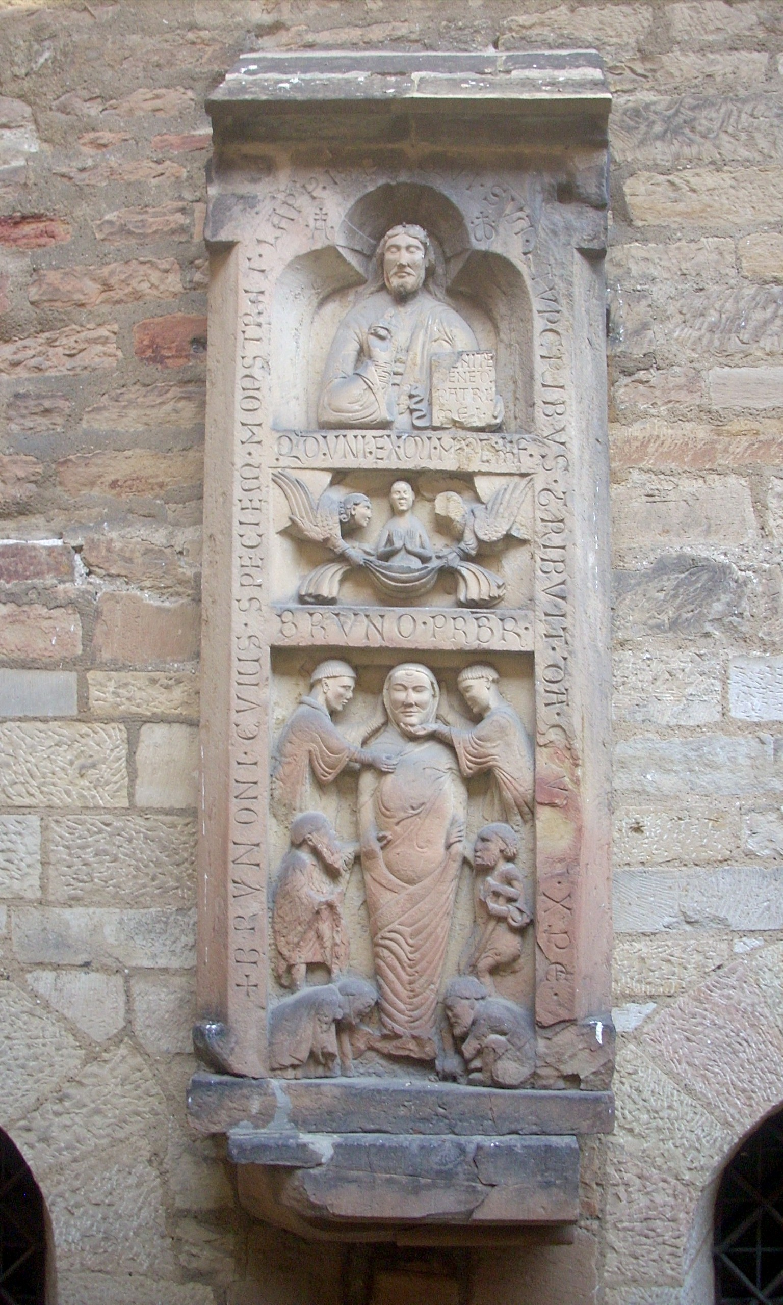 Hildesheim, Domapsis Südseite, Grabmal des Priesters Bruno